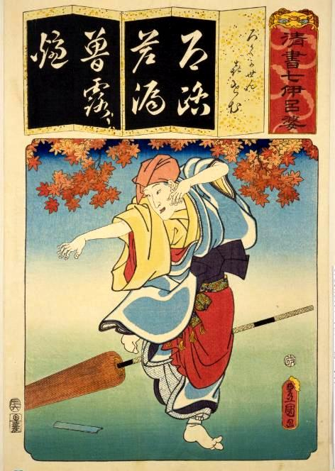 豊国『清書七伊呂波 ろくかせん喜せん』